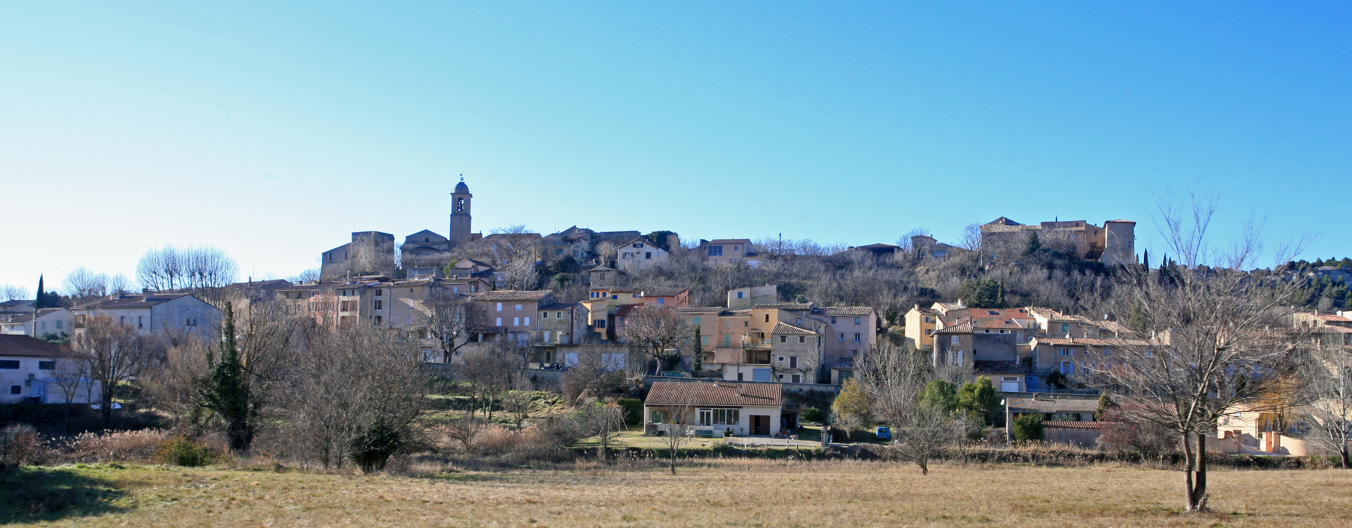 Mormoiron, France